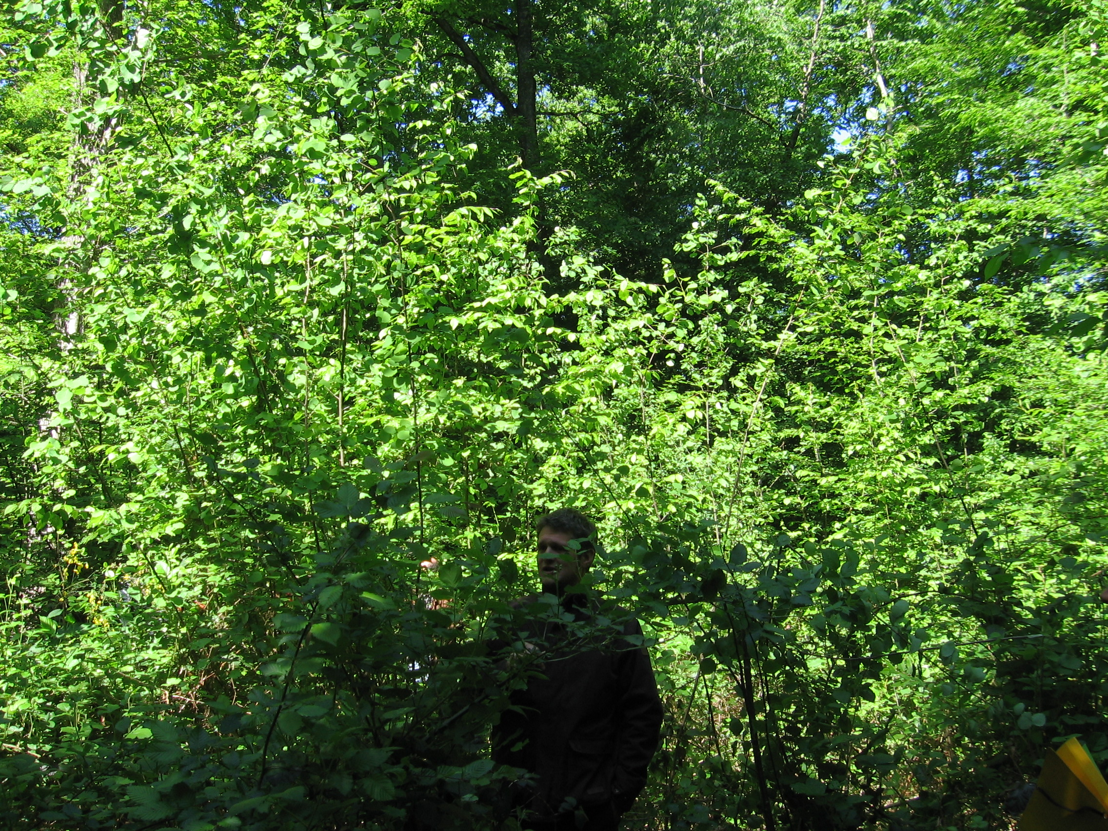 Régénération dans une trouée en FIr (futaie irrégulière feuillue), ici dans la Nièvre au printemps 2011